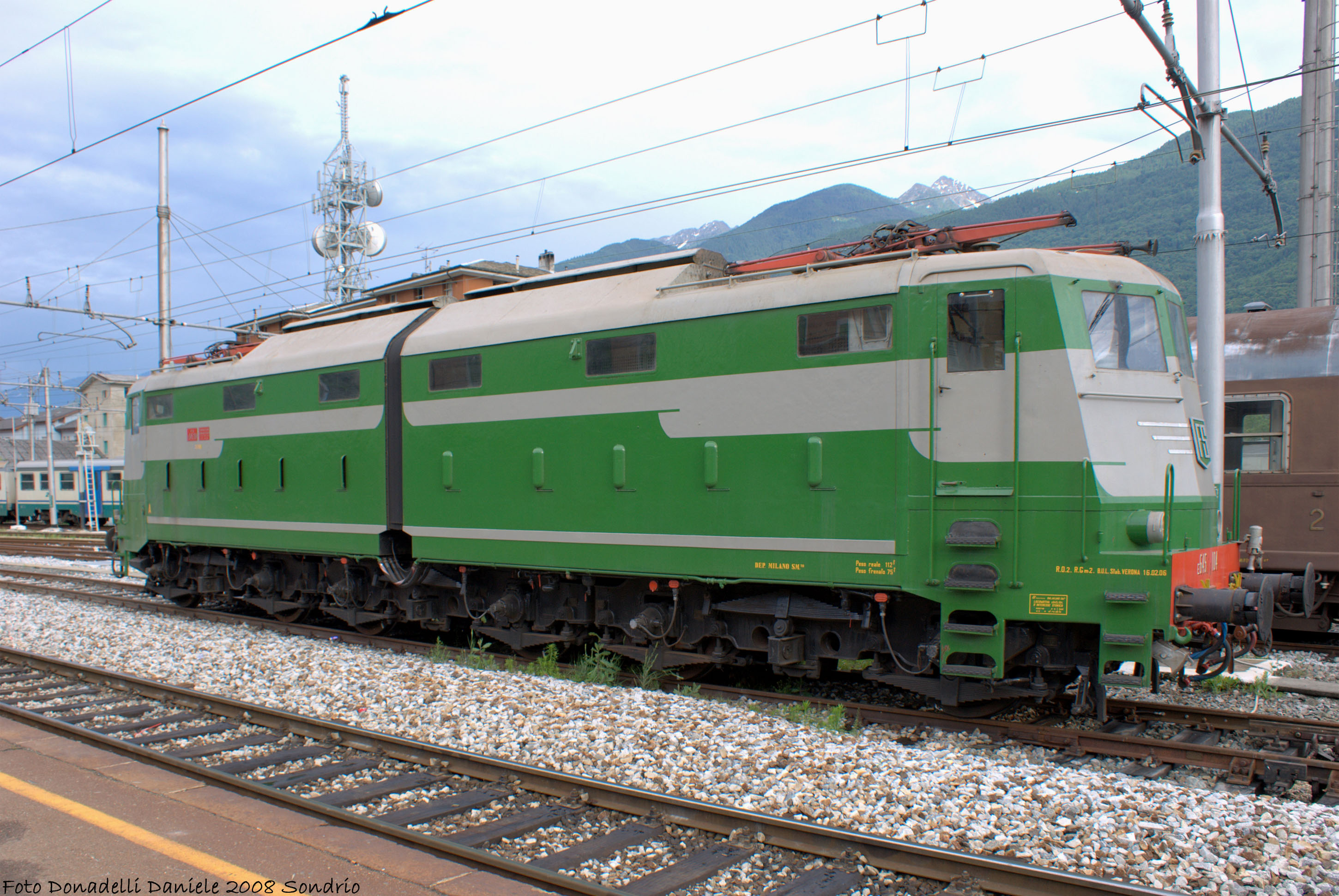 Locomotiva elettrica E.645.104 delle Ferrovie dello Stato in livrea grigio-verde, in sosta a Sondrio